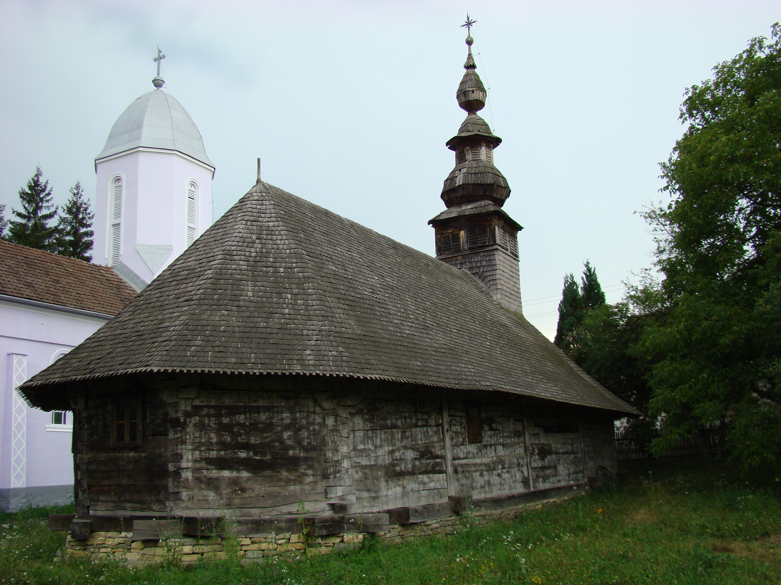 Biserica de lemn din Julița